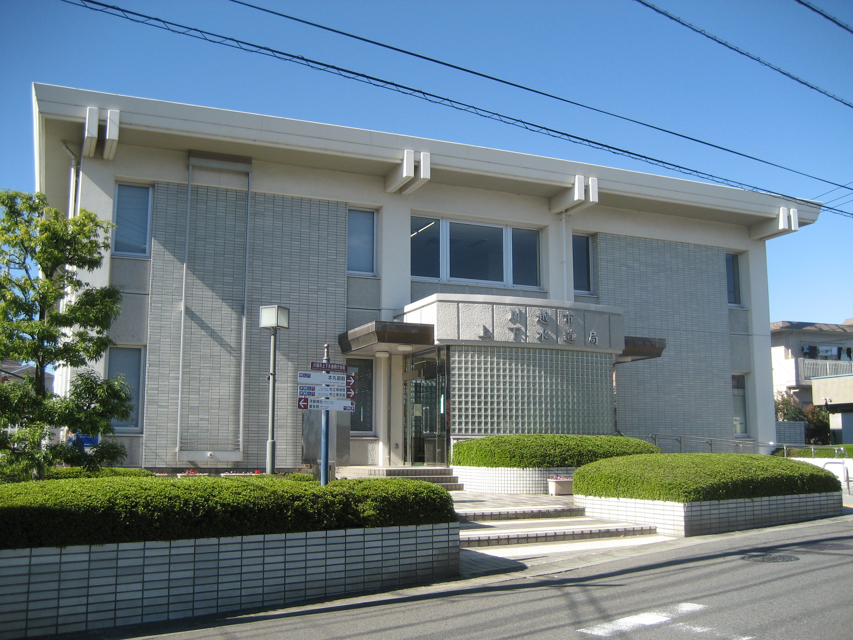 川越市上下水道局庁舎